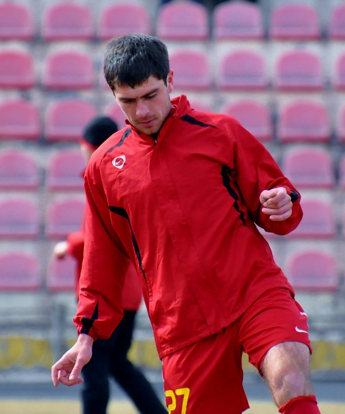 Александр Кочура — украинский футболист.